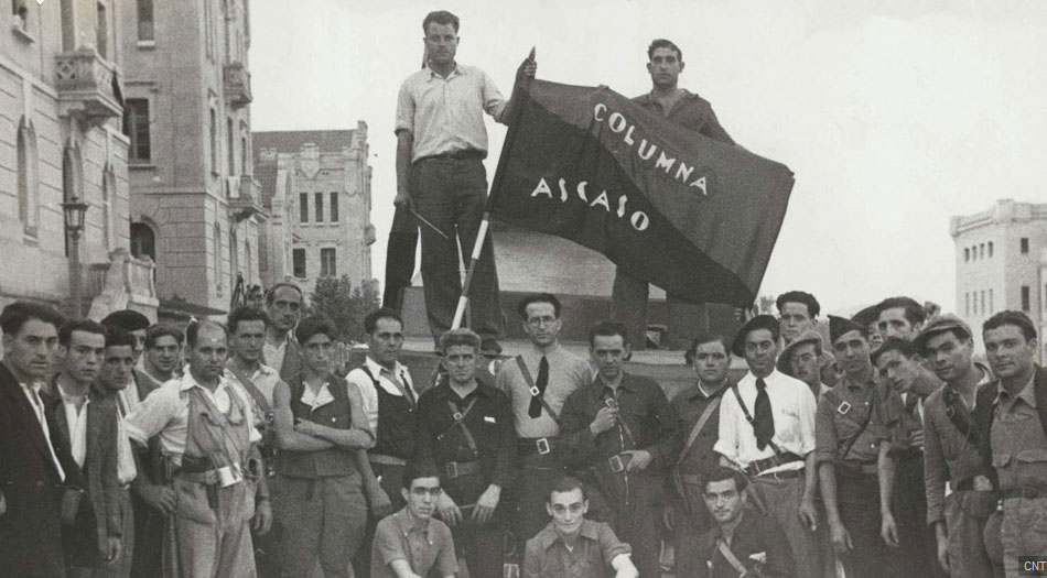 Foto de la Columna Ascaso antes de partir al frente Aragón